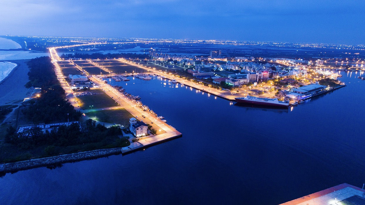 傍晚的安平漁港。在拍攝期間有取得商港安檢所授權，但在六月份已確定不可再進入拍攝。